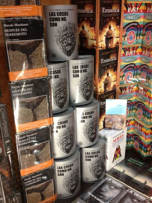 Ejemplares del libro "Las Cosas Como No Son", del escritor Mariano Marquevich, expuestos en una librería